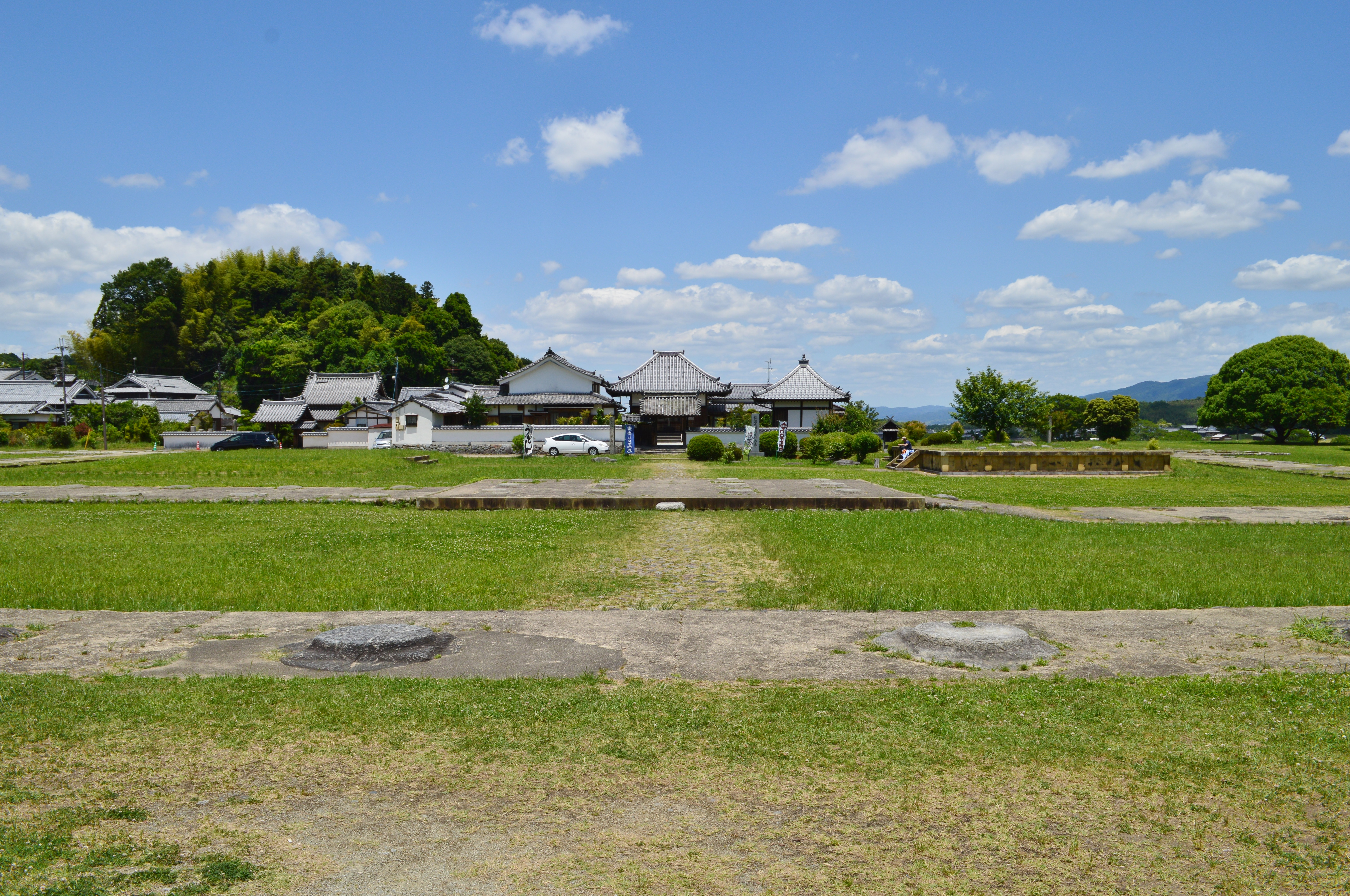 川原寺跡・弘福寺 遠景